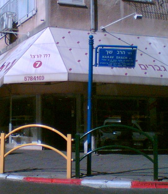 רחוב הרב שך בבני ברק, לשעבר רחוב הרצל. צילם דוד שי {| style="border: 1px solid #AFAFAF; font-size: 90%; background-color: #FCECAD; margin: 0 auto 1em auto; padding: .2em; clear: both;" align="right" |תמונה זו בציון קרדיט ל :he:משתמש:דוד שי|דוד שי במוסף לשבת של עיתון :he:המודיע|המודיע , 10.7.2009, בכתבה על שמות רחובות מוזרים בישראל, בפינת "קוראים קוראים ומגיבים" - כאשר התגובות עצמן הופיעו ללא קרדיט לאף אדם... |} |NoCategory=